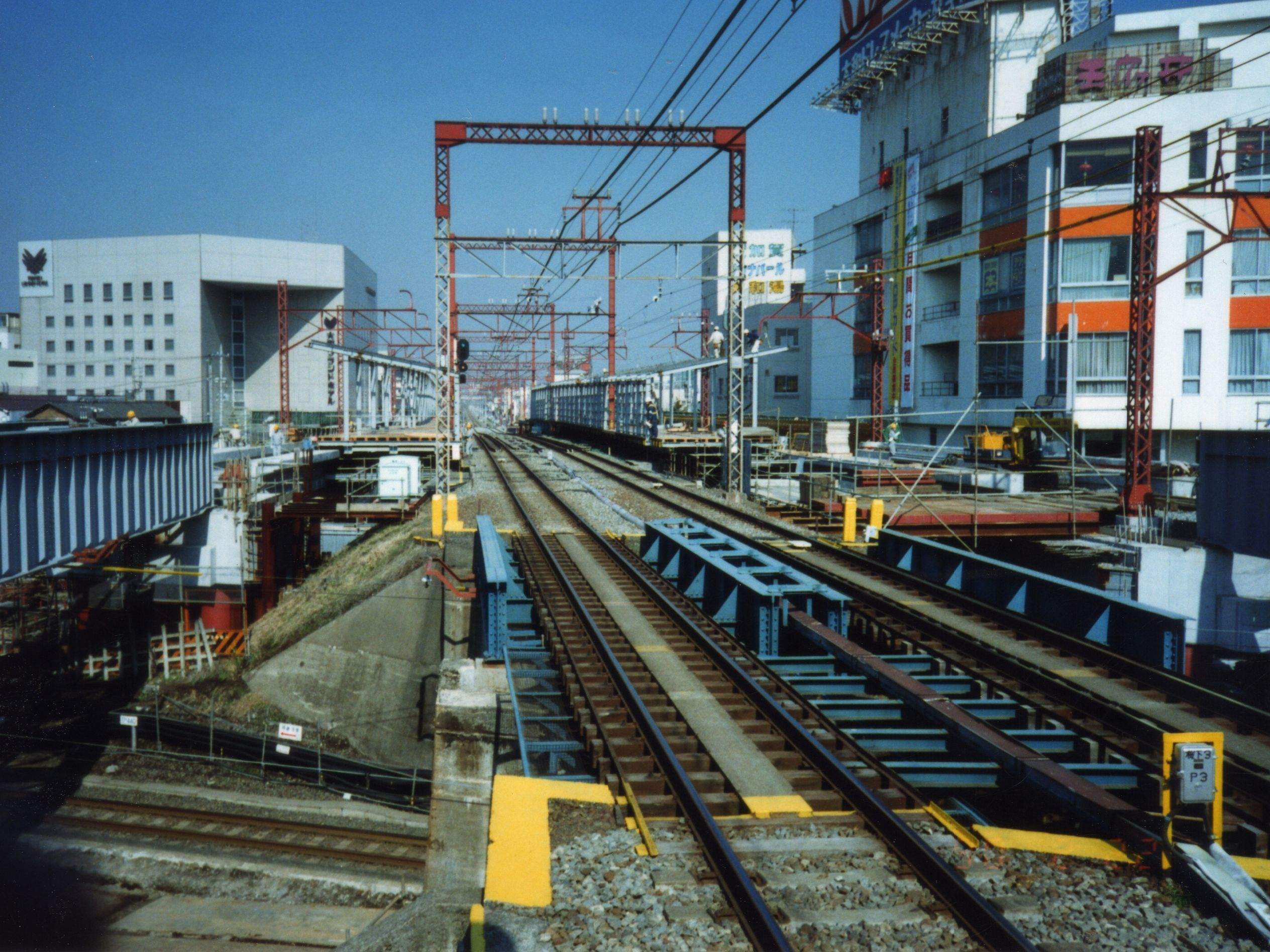 高架化工事に伴う仮ホームを建設中の小田急大和駅